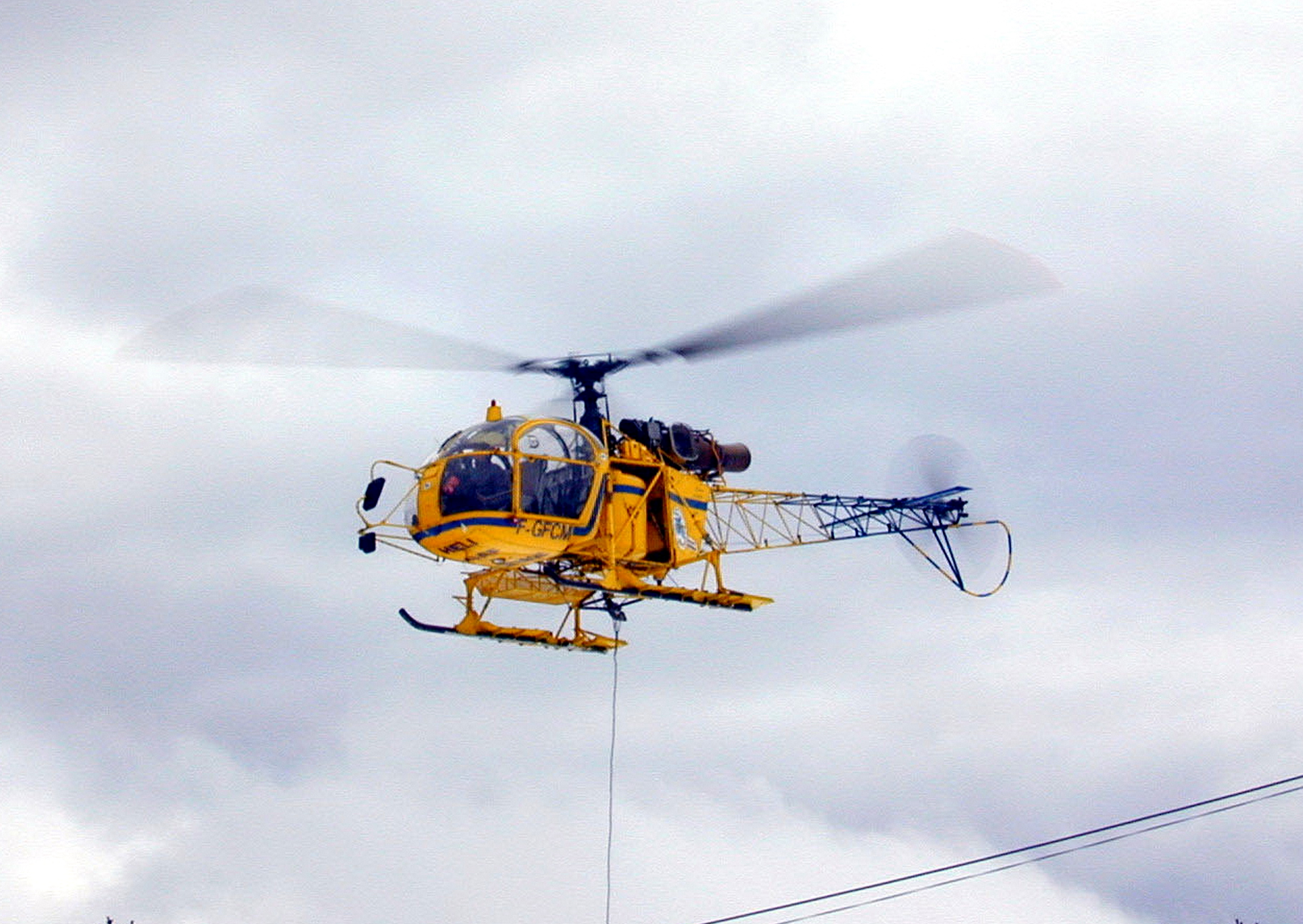 Hélico F-GFCM à Gréolières (06)